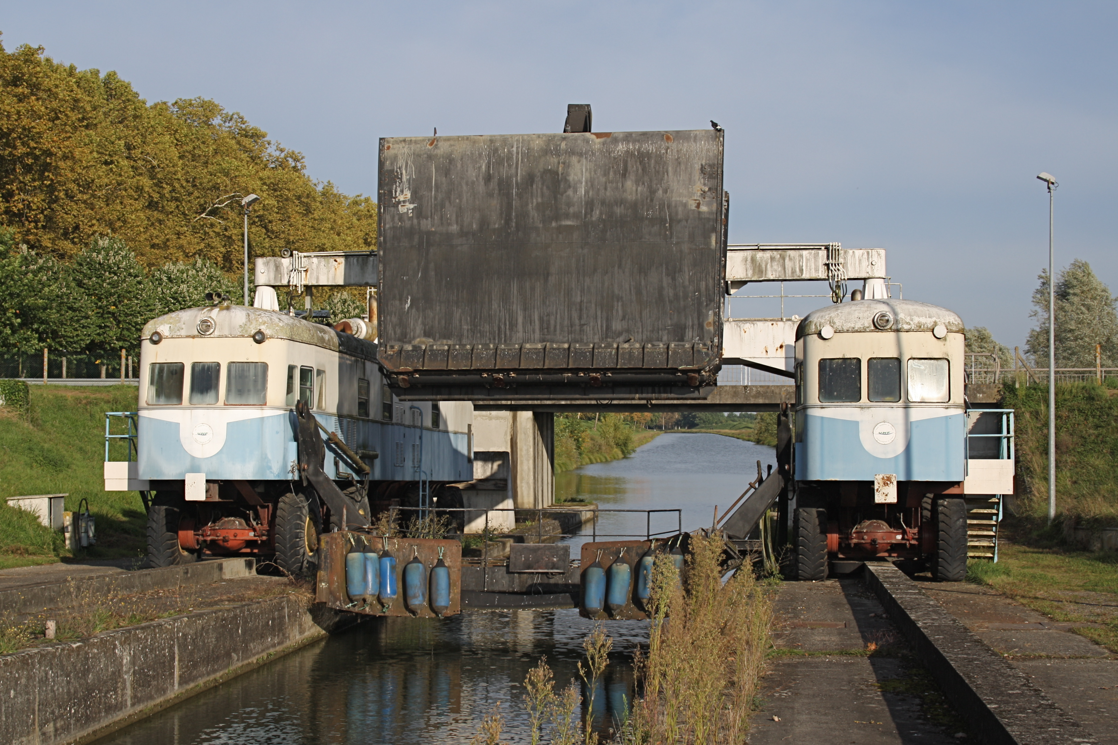 Triebfahrzeuge des Wasserkeilhebewerks Montech